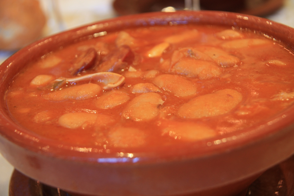 Judiones de la Granja servidos en un restaurante de San Ildefonso, Segovia.